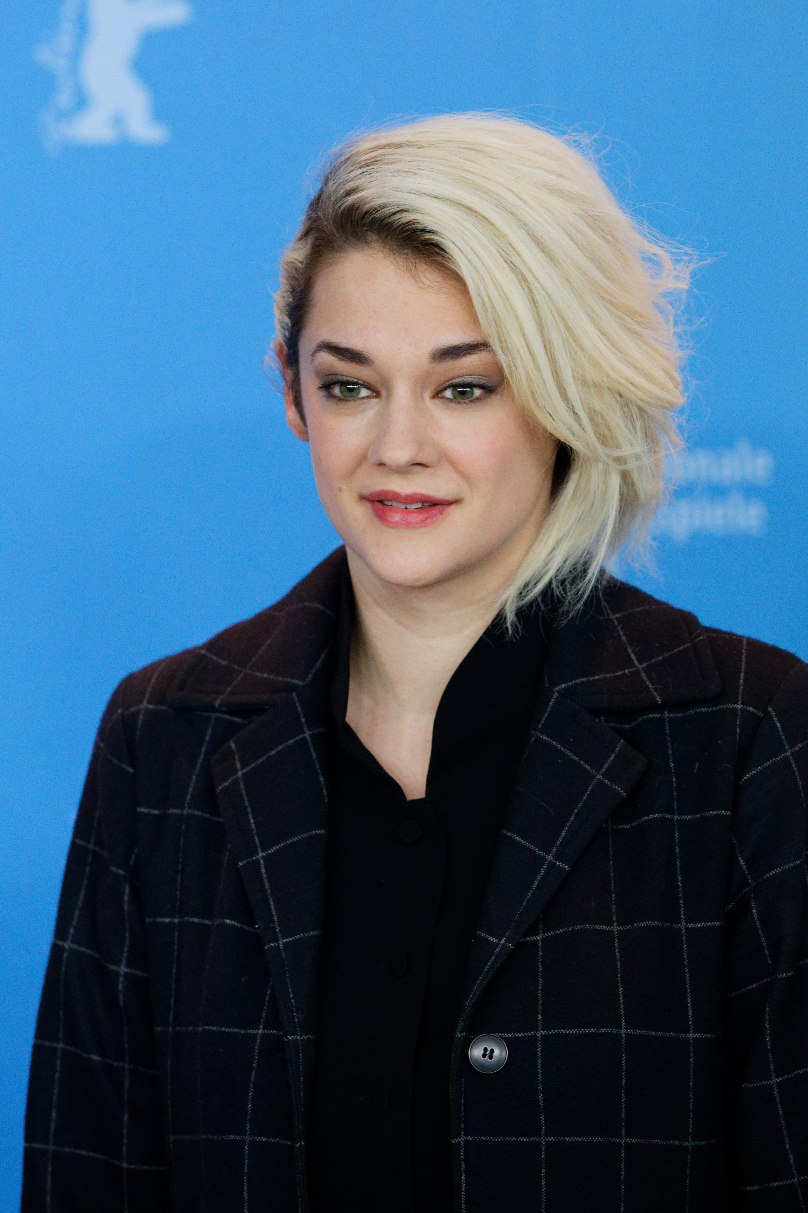 Victoire Du Bois beim Photo Call zu Call Me By Your Name bei der Berlinale 2017